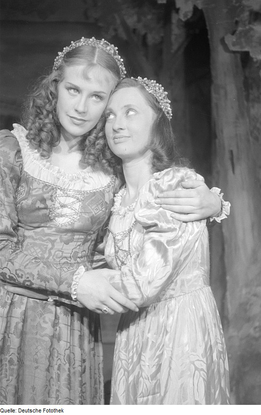 Original image description from the Deutsche Fotothek Szenenbilder